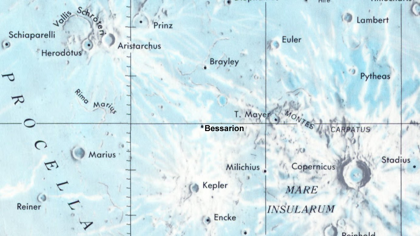 Cráter lunar Bessarion. Localización. (Lunar Chart LPC1. Second Edition)